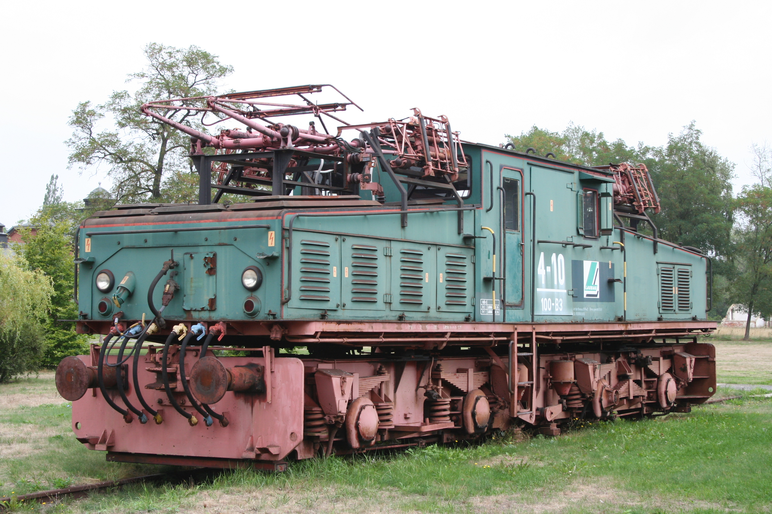 El-Lokomotive 4-10-100-B3 vom Typ EL-2 Knappenrode 06.09.06